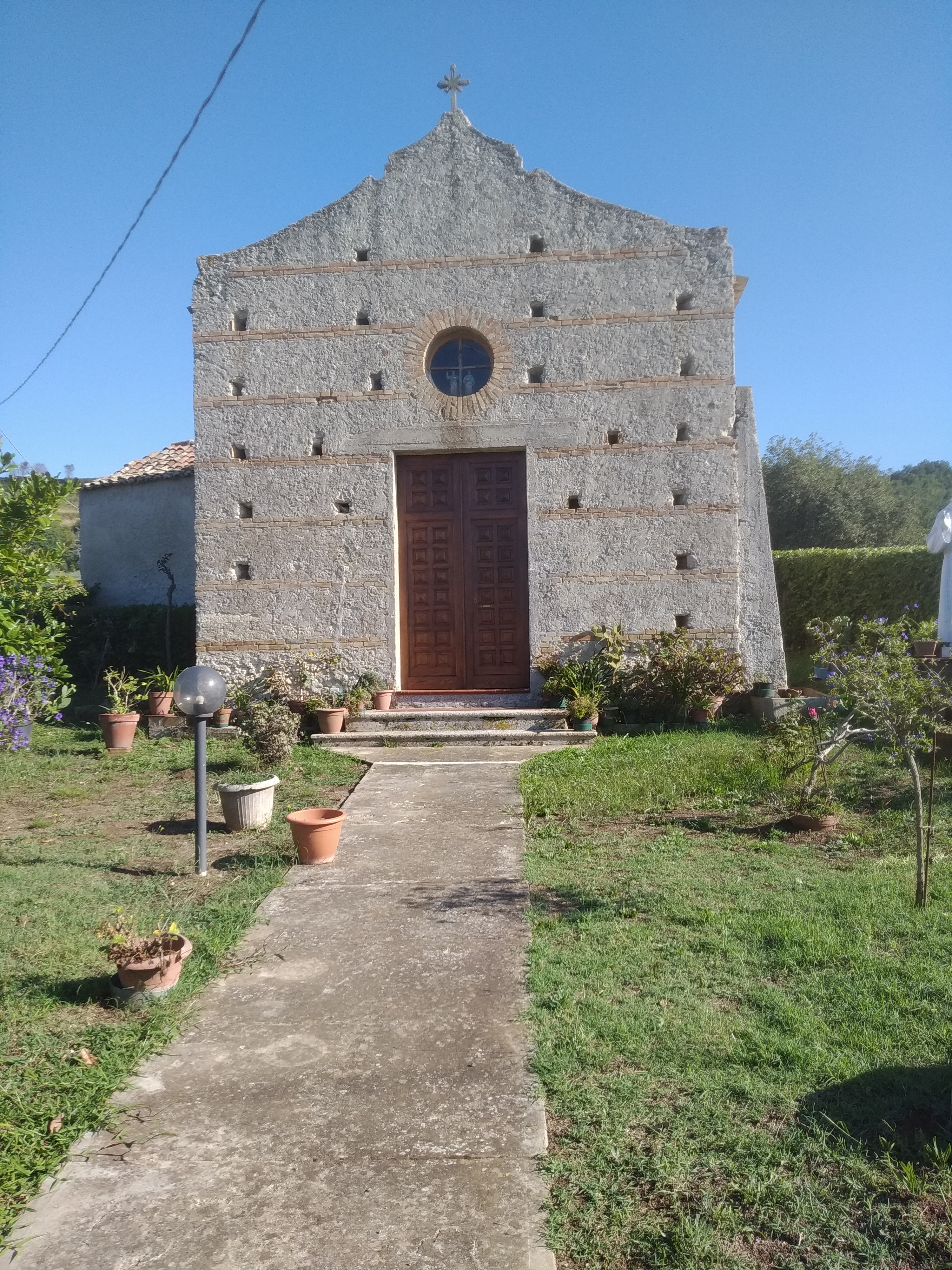 Chiesa dei SS. Cosma e Damiano situata a Brattirò